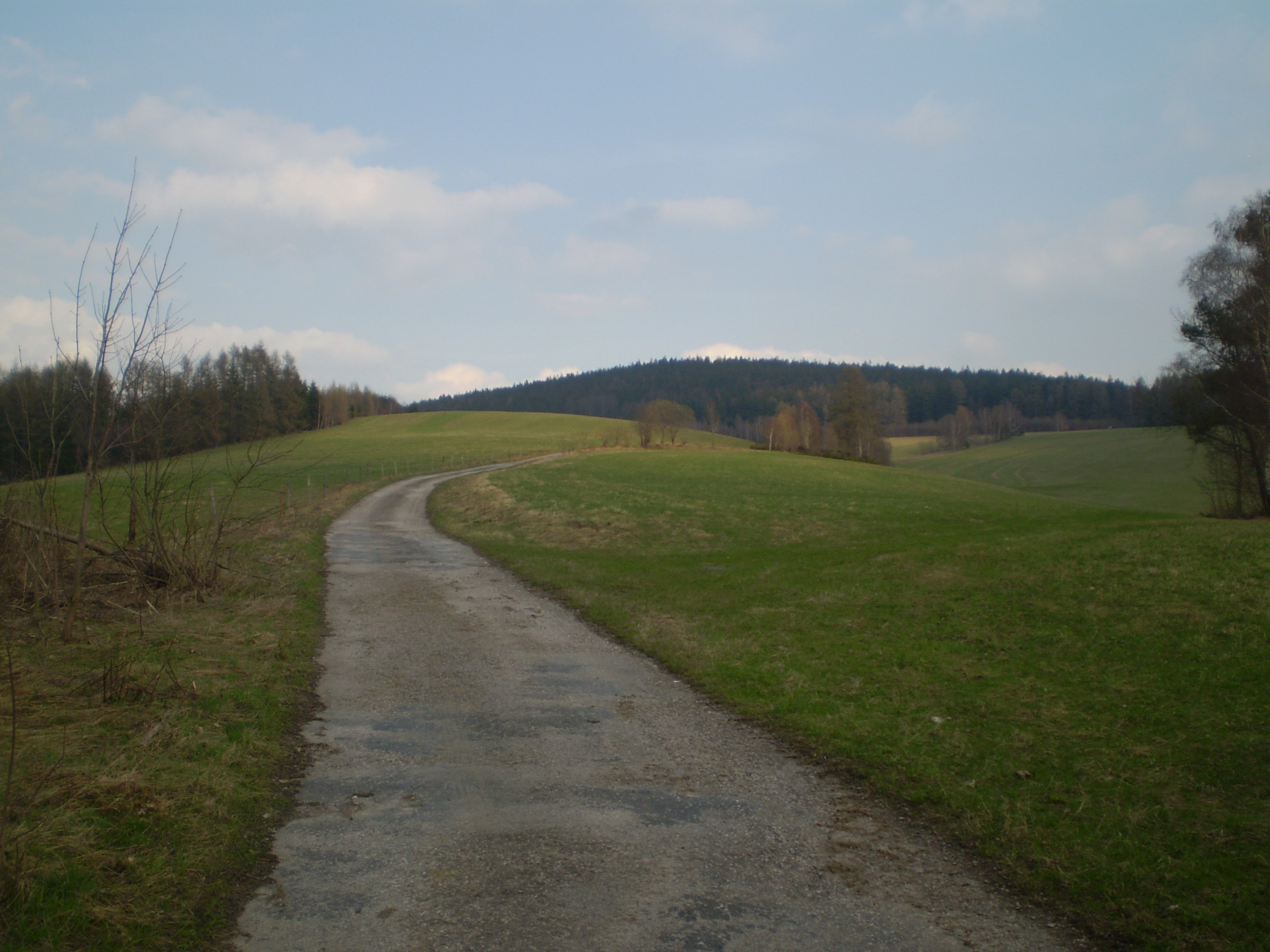 Jedlina, Orlické hory